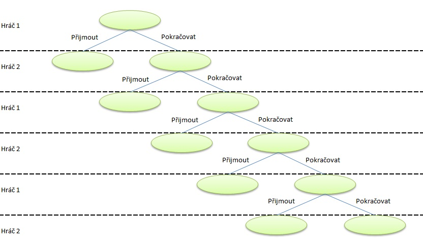 Rozšířená forma hry - postup tvorby stromu hry - fáze 1 Modifikace příkladu z publikace: DLOUHÝ, Martin; FIALA, Petr. Úvod do teorie her. 2.přepracované vydání. Vysoká škola ekonomická v Praze : Nakladatelství Oeconomica, 2009. 120 s. ISBN 978-80-245-1609-7.